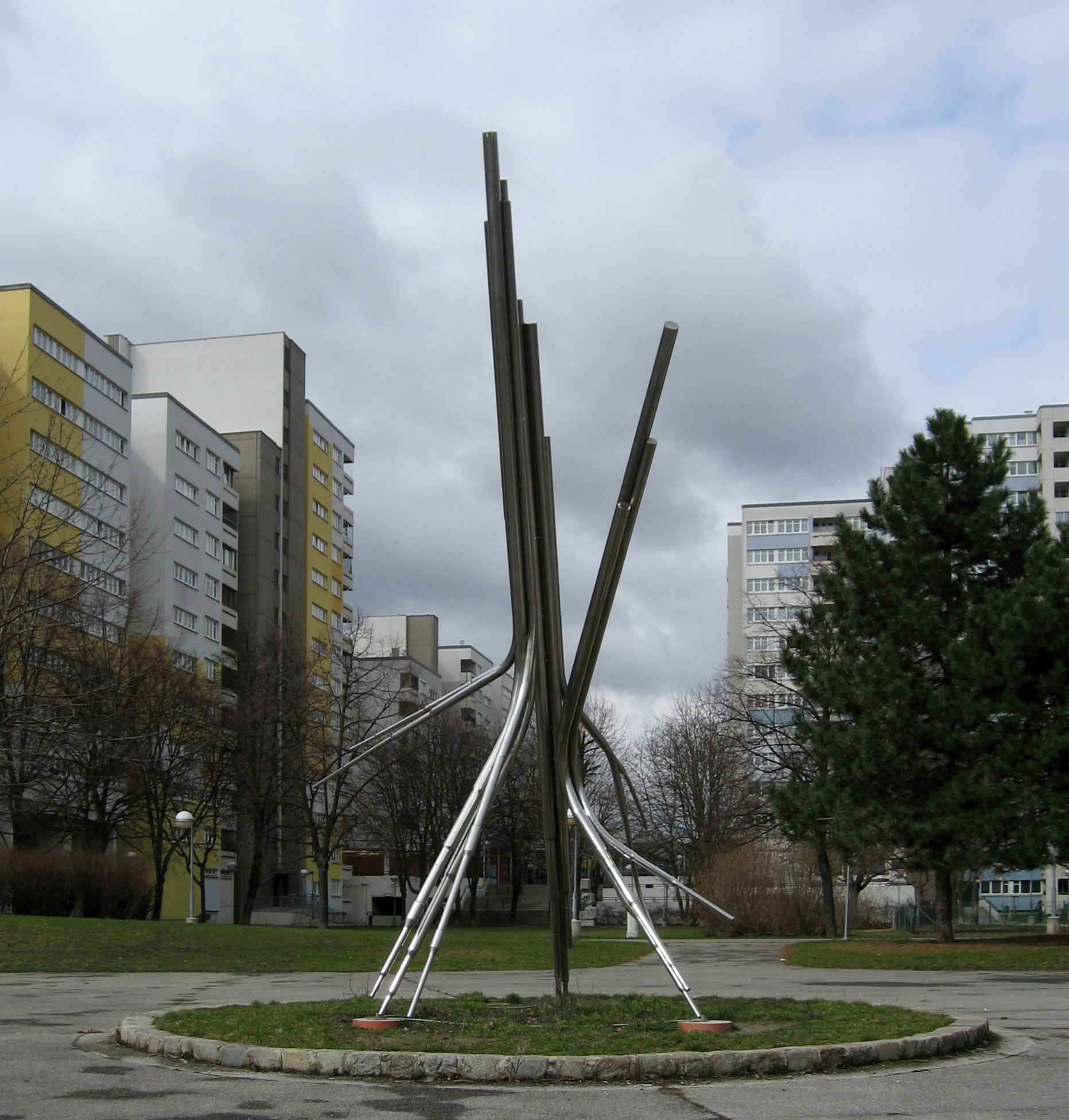 Wien, Trabrenngründe, Skulptur "Heliakos ST 2" von Josef Schagerl